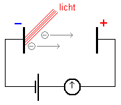 Experiment: Foto-Elektrisch Effect